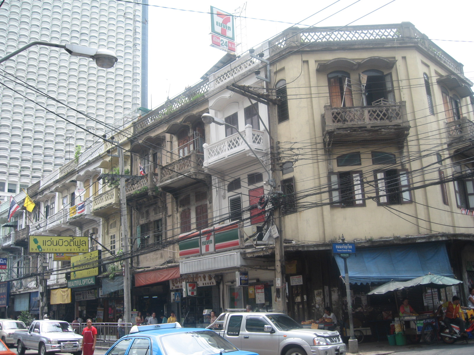 Thanon Charoen Krung, Bangkok, Thailand.